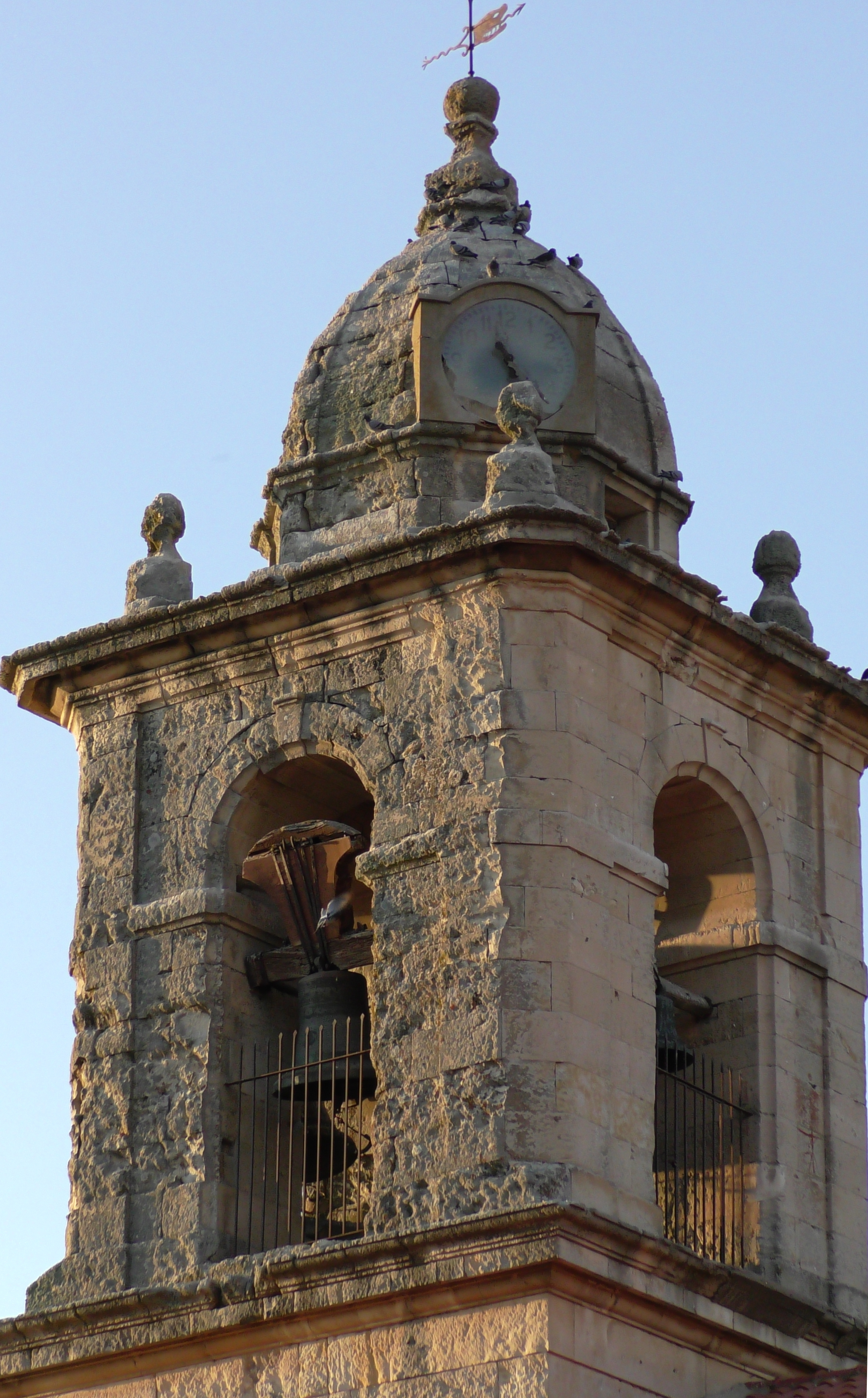 Argujillo